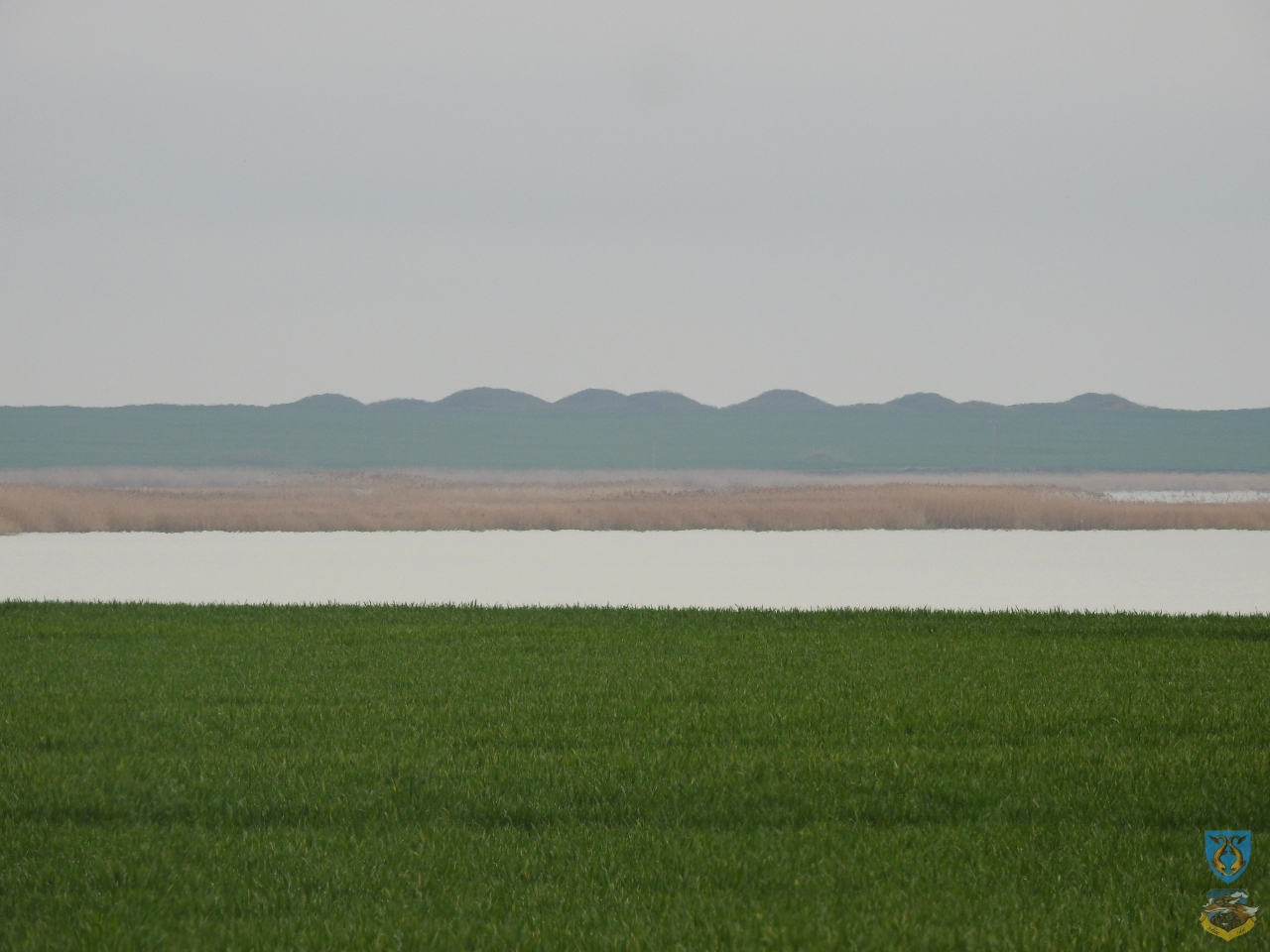 Necropolă tumulară 01